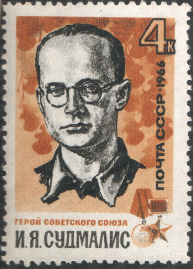 Почтовая марка СССР - Судмалис Имант Янович, Герой Советского Союза